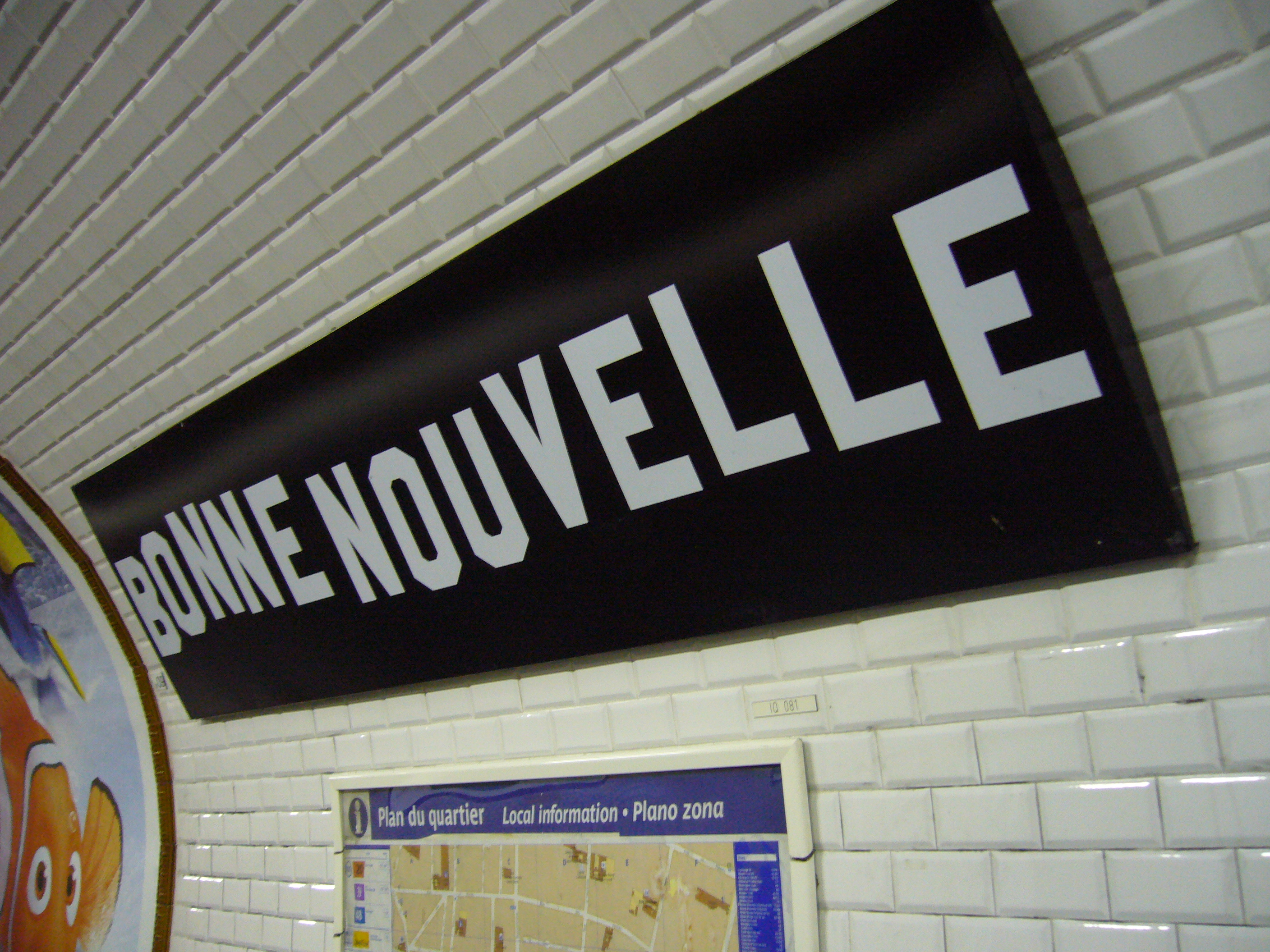 Vue du nom de la station Bonne Nouvelle sur la ligne 8 du métro de Paris.